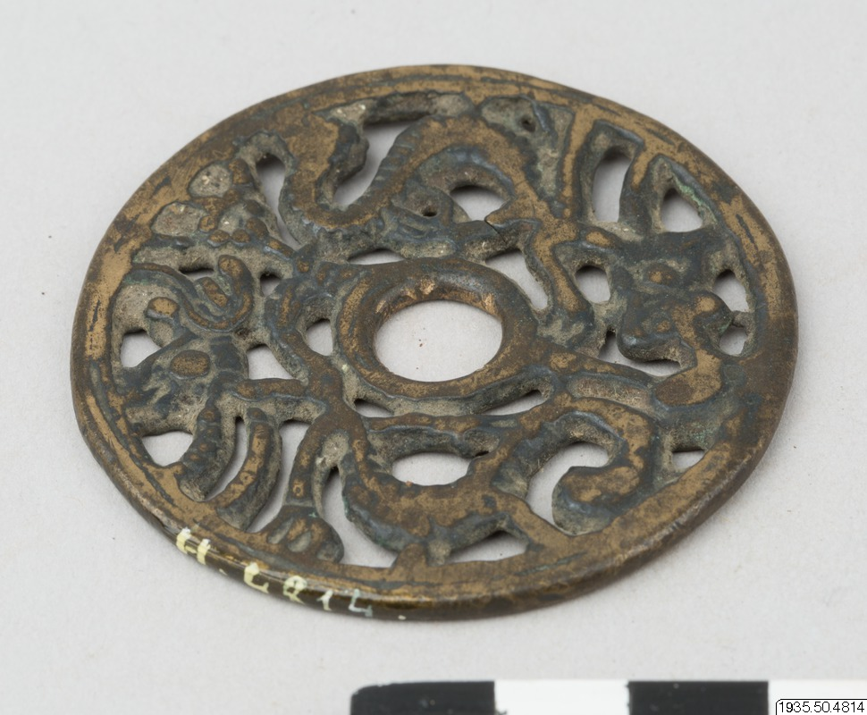 Title: amulett Description: 1935.50.4814 Hedinexpeditionen, fjärde centralasiatiska expeditionen (1927-1935) Classifications Type: Föremål amulett Subject: Kulturhistoria Sven Hedin Medium: metall Properties Language: sv Provenance Publisher: Etnografiska museet Identifier: 1935.50.4814 H.4814 Institution: Etnografiska museet Provider: Swedish Open Cultural Heritage | K-samsök Providing Country: Sweden